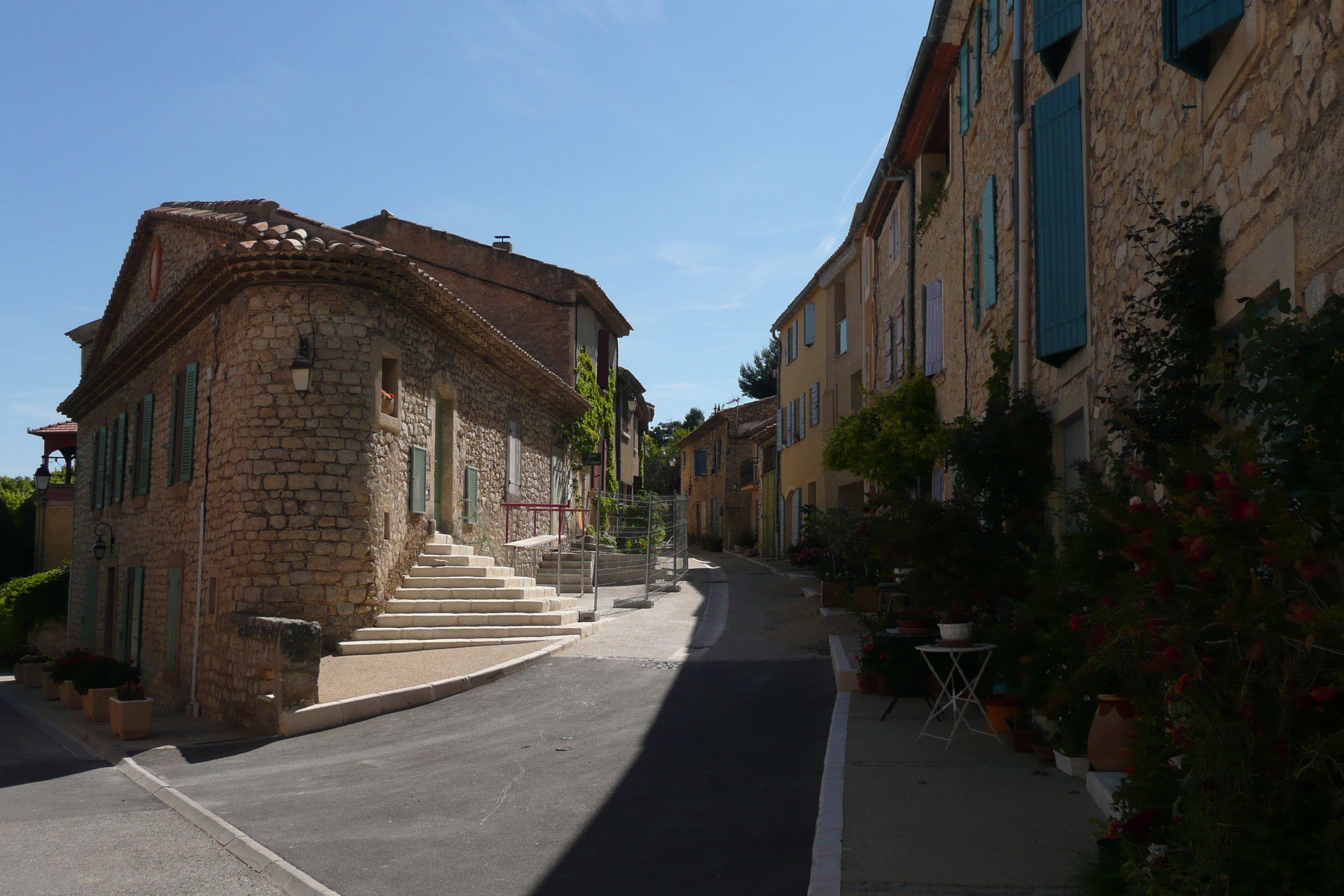 Vitrolles-en-Lubéron.